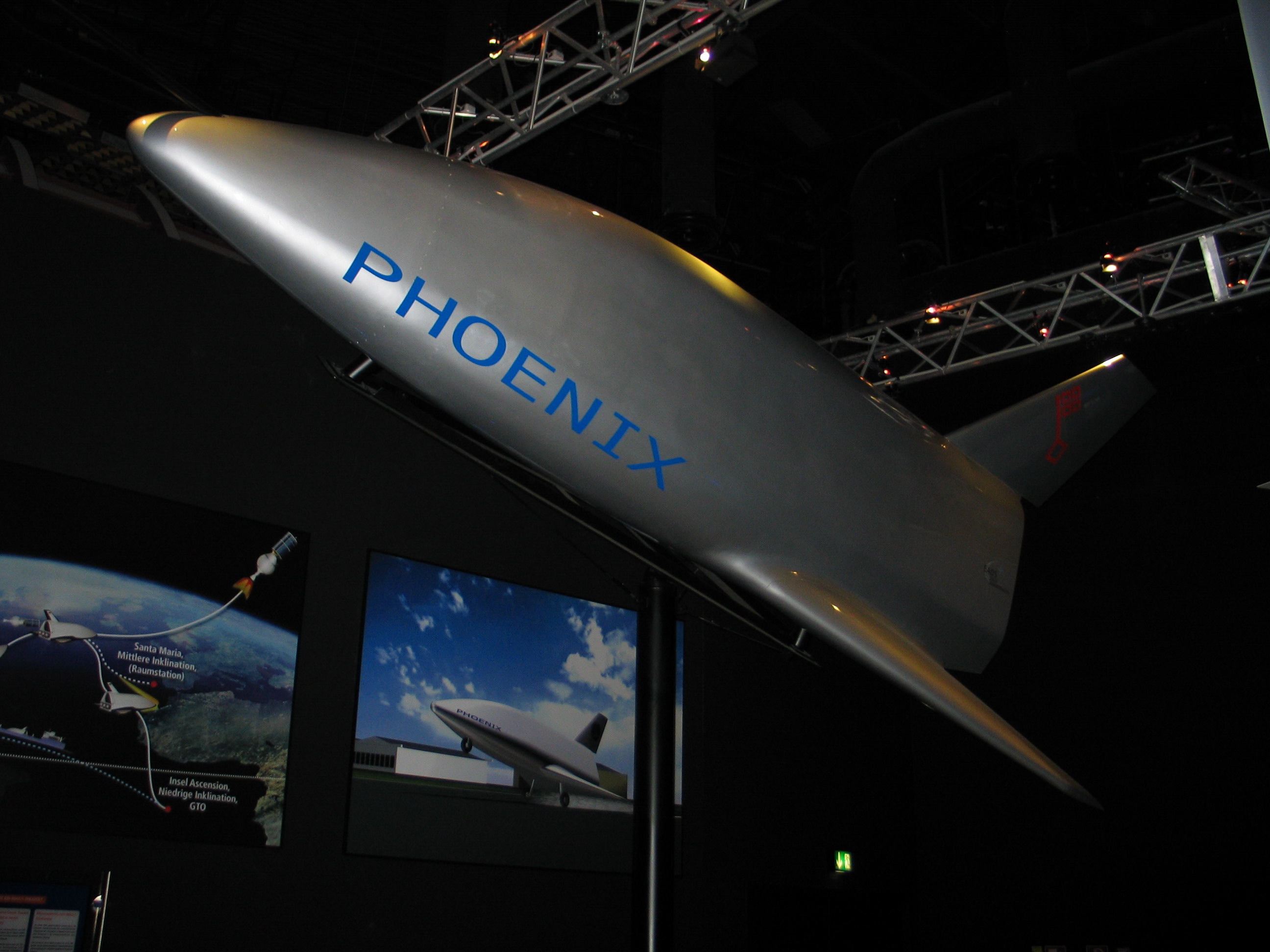 Modell des Phoenix Raumgleiters im ehemaligen Space Park Bremen